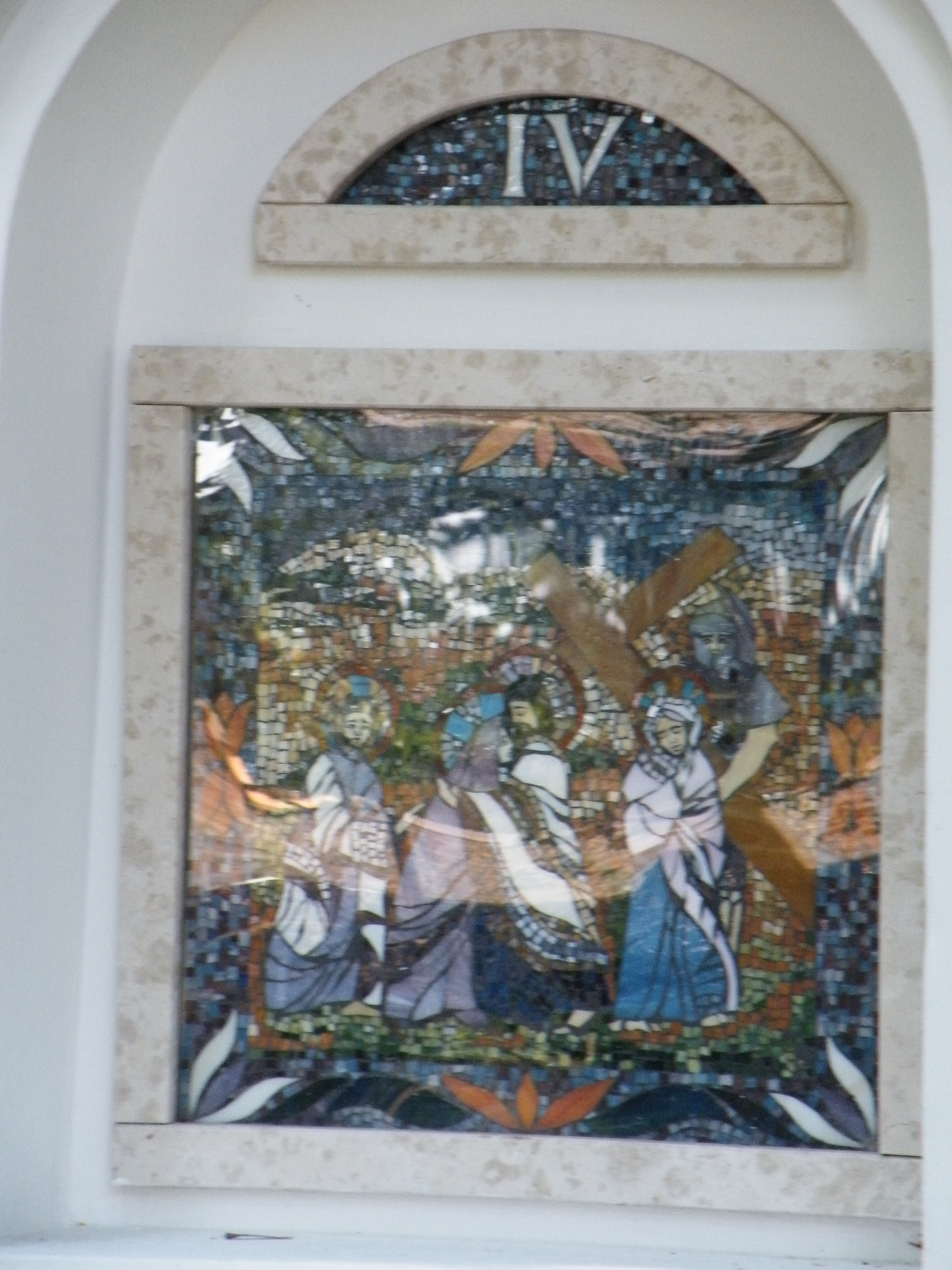 Stációk a Palóc ligetben, Balassagyarmaton